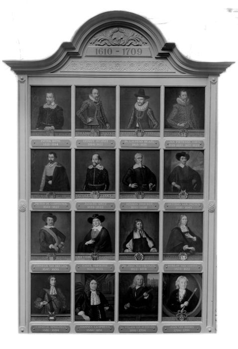 Negatief. Lijst met geschilderde miniatuurportretten van personen die het ambt van Gouverneur-Generaal in Nederlands-Indië bekleed hebben in de periode 1610-1709